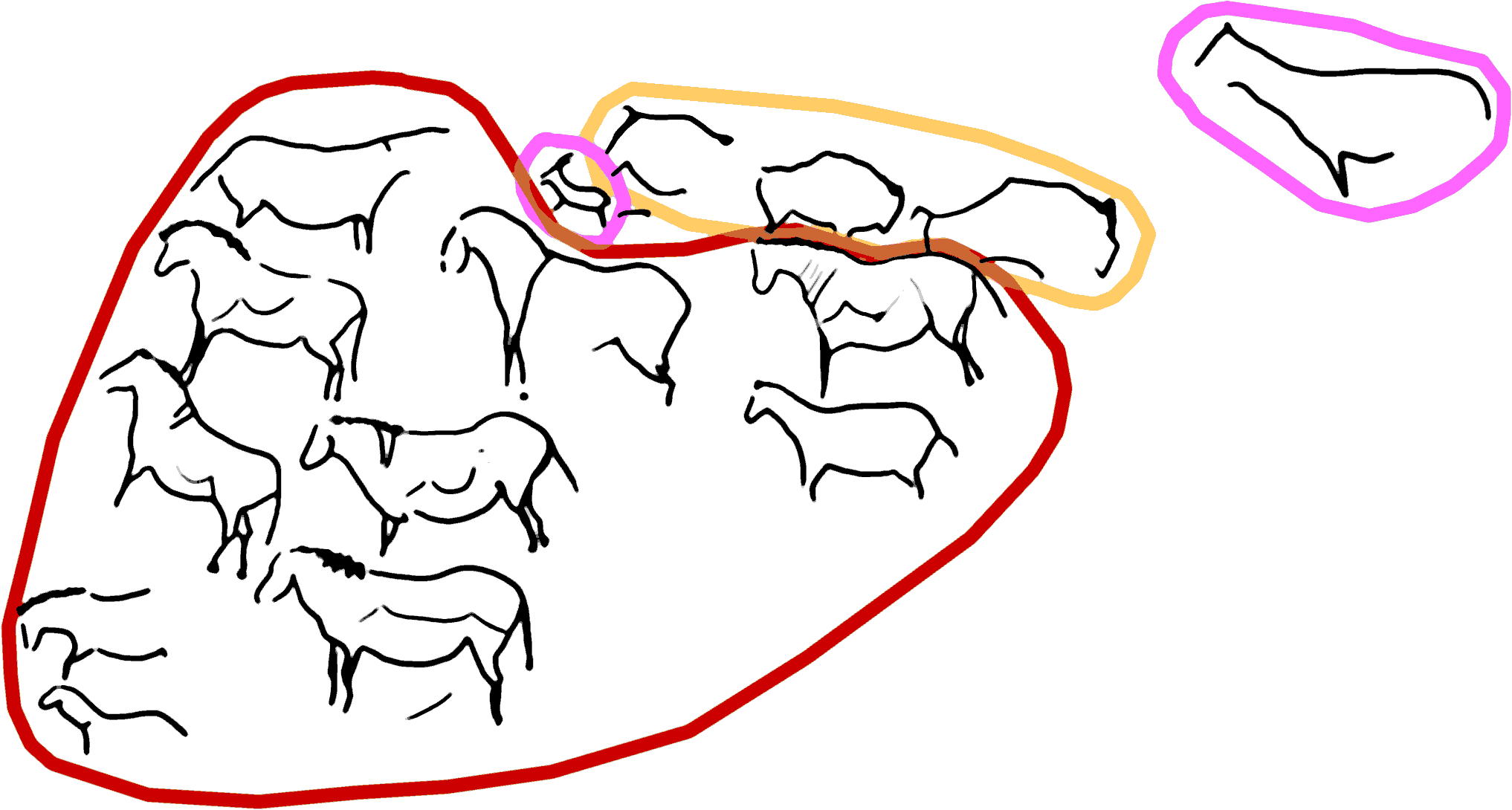 Asociación de animales en el gran panel de la Cueva de Ekaín (Cestona, Guipúzcoa, España) según el paradigma de Leroi-Gourhan